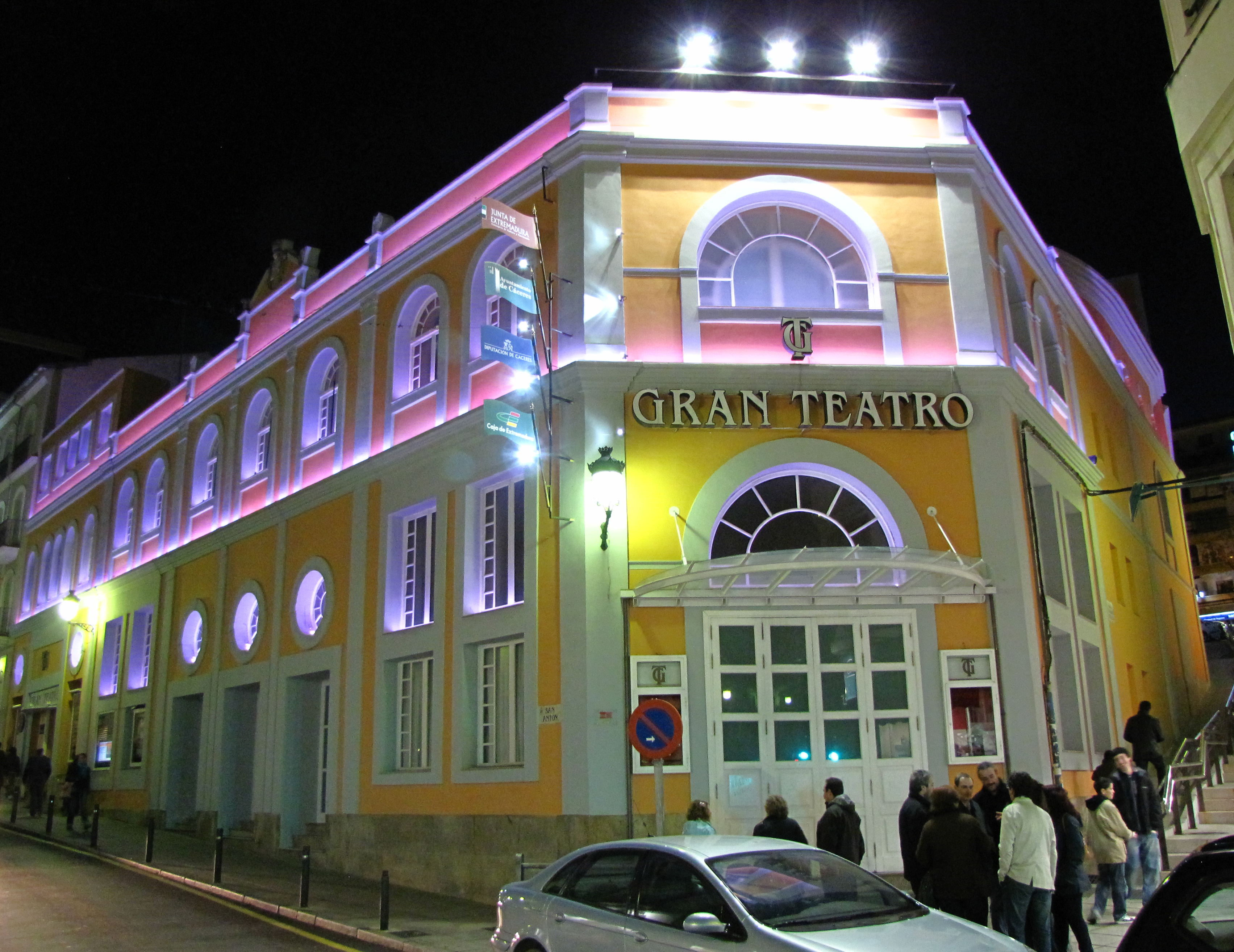 Vista nocturna del Gran Teatro de la ciudad de Cáceres